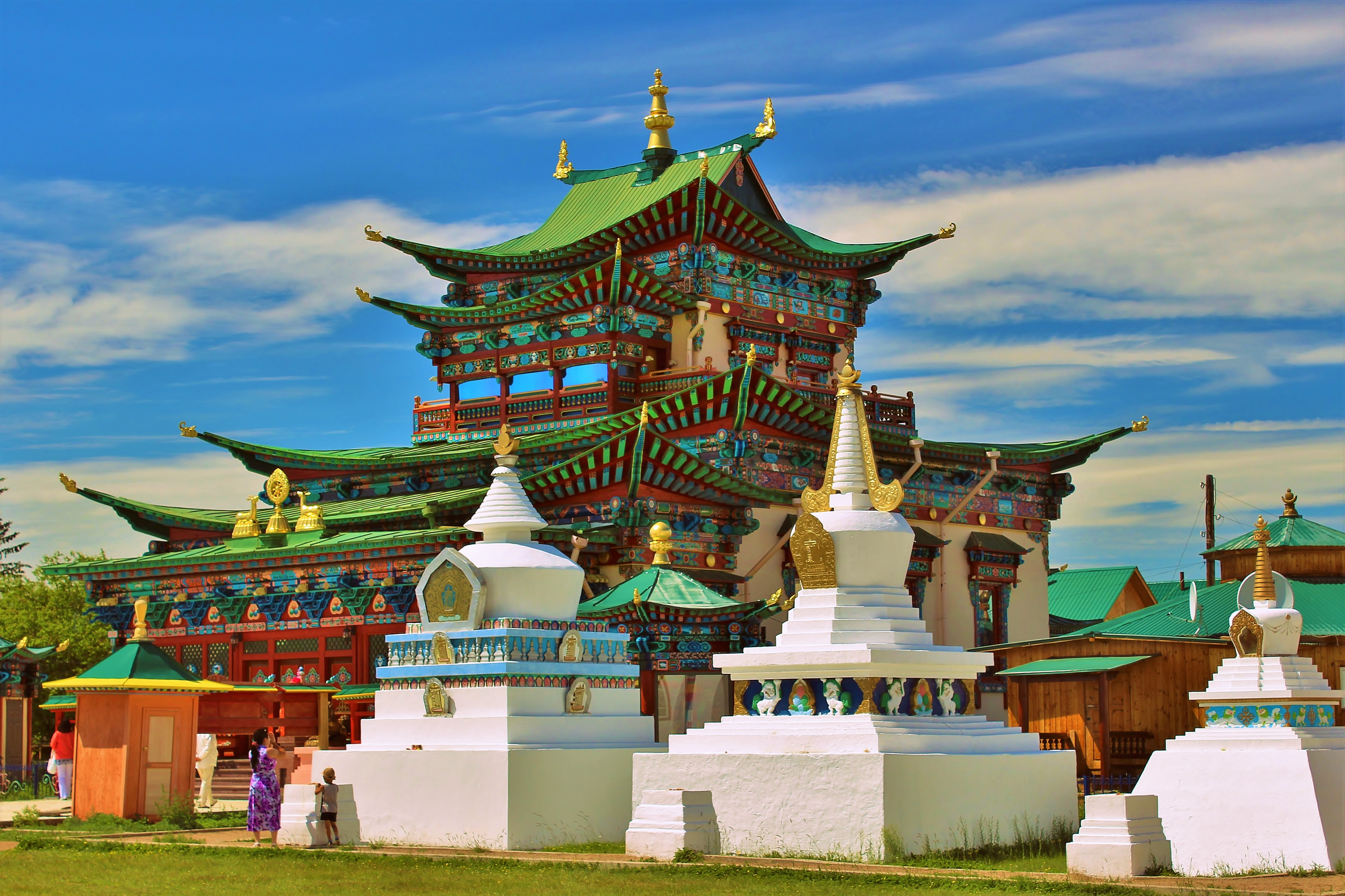 Храм Пандито Хамбо Ламы Даша-Доржо Итигэлова в Иволгинском дацане. Бурятия.